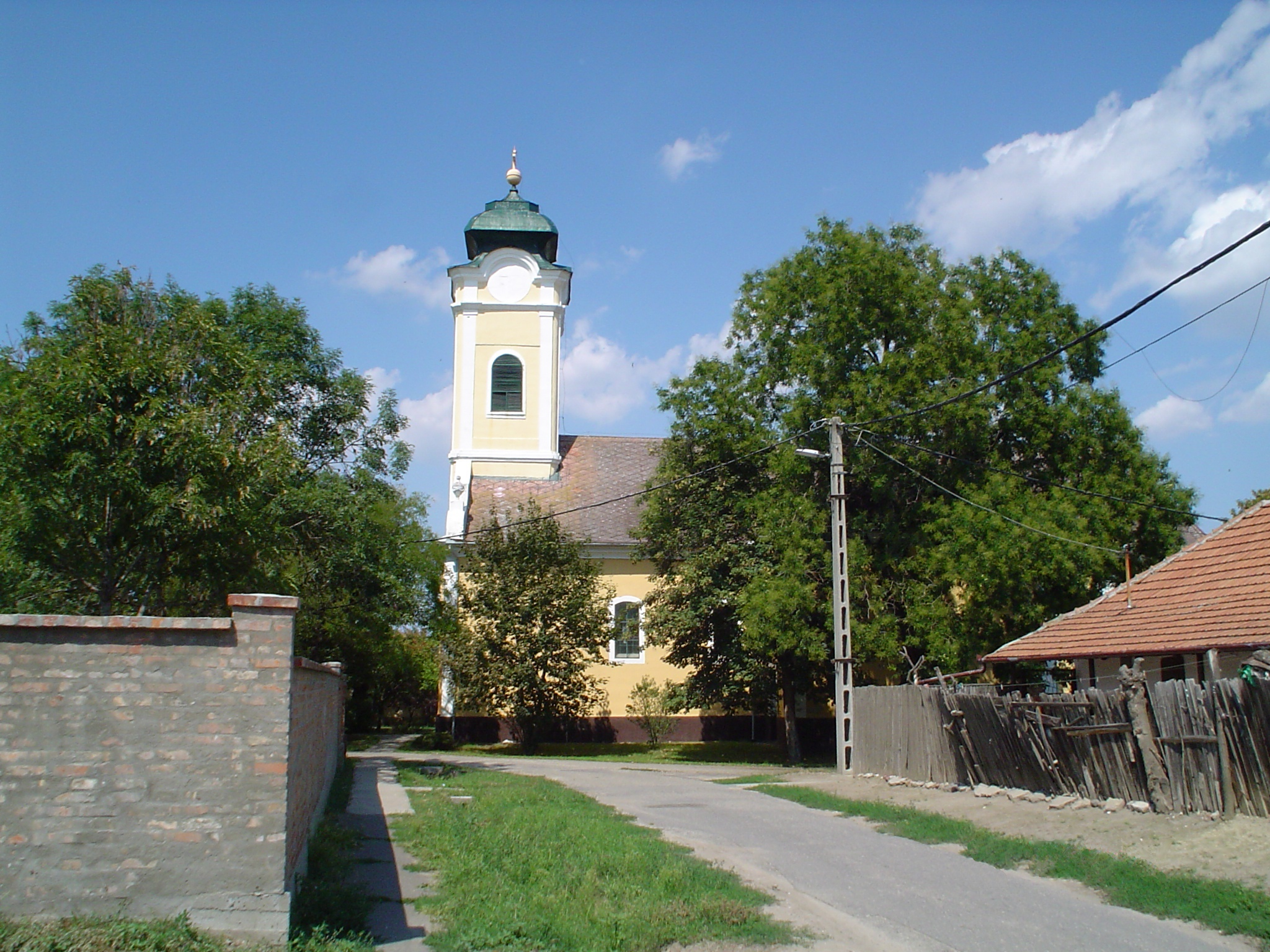 Cibakháza Mindenszentek római katolikus katolikus temploma.